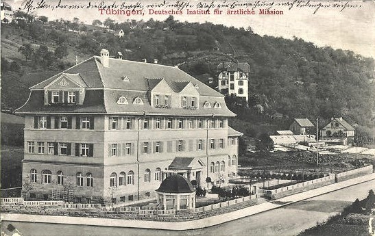 Tübingen. Deutsches Institut für ärztliche Mission in seinem ersten Sitz in der Nauklerstraße Ecke Mohlstraße.